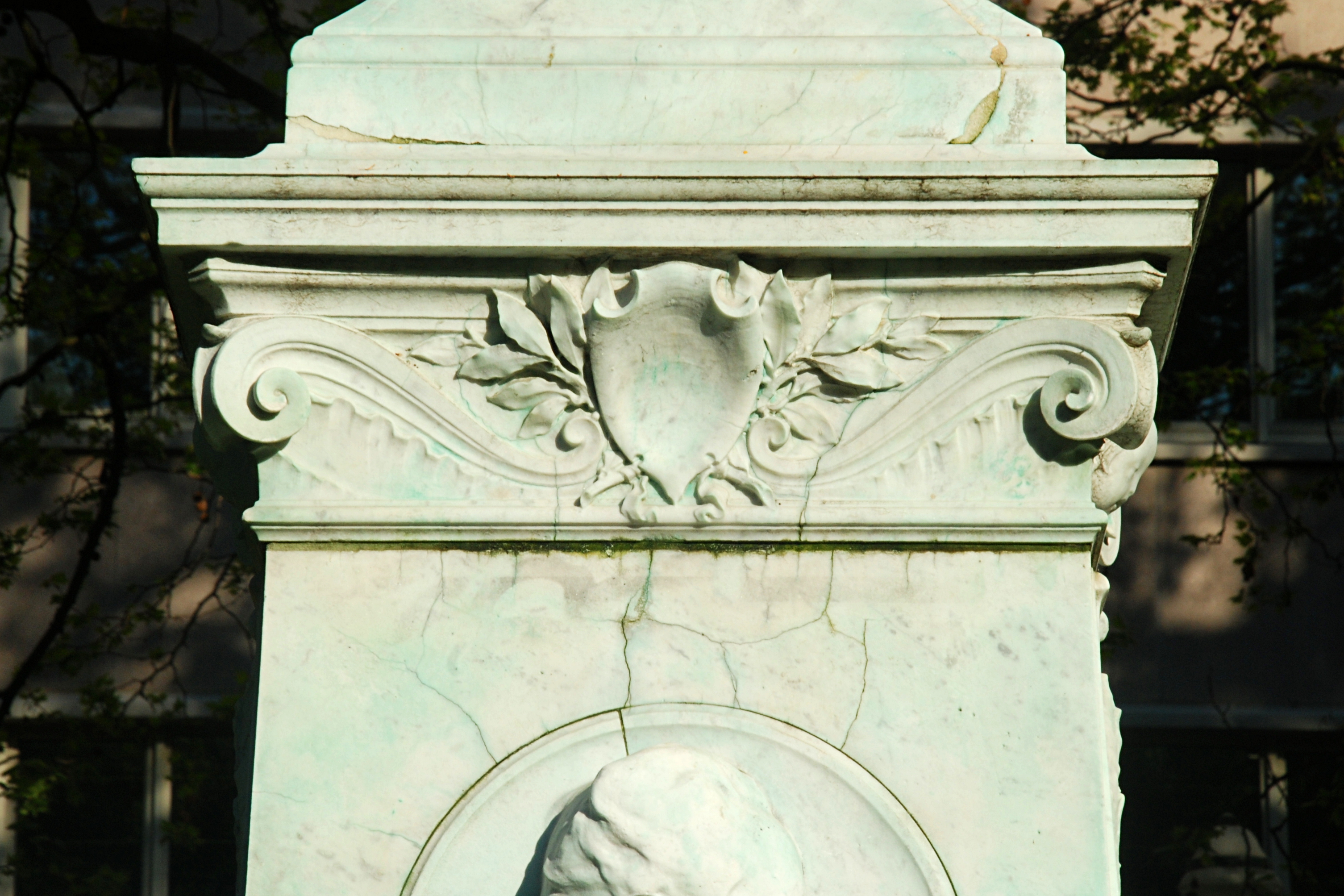 Belgique - Bruxelles - Monument Julien Dillens